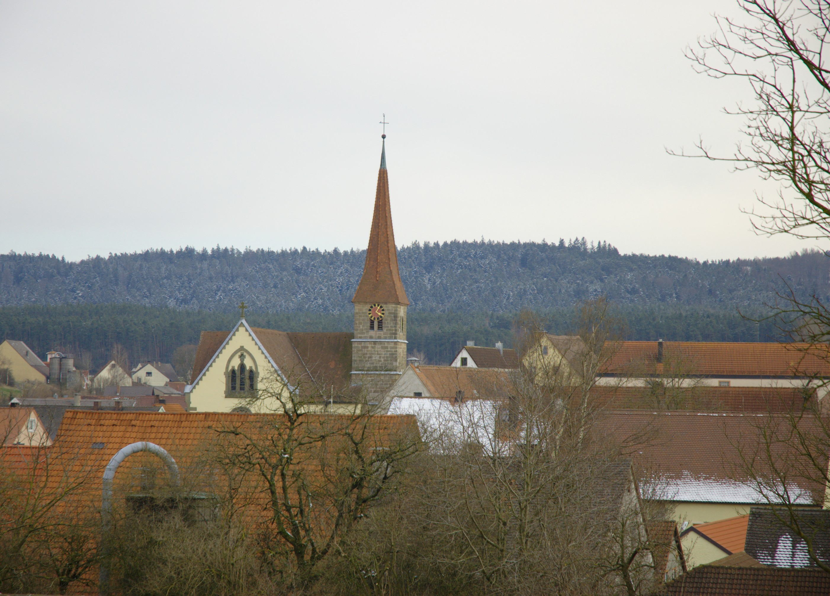 Mitteleschenbach mit Blick auf die St. Nikolauskirche